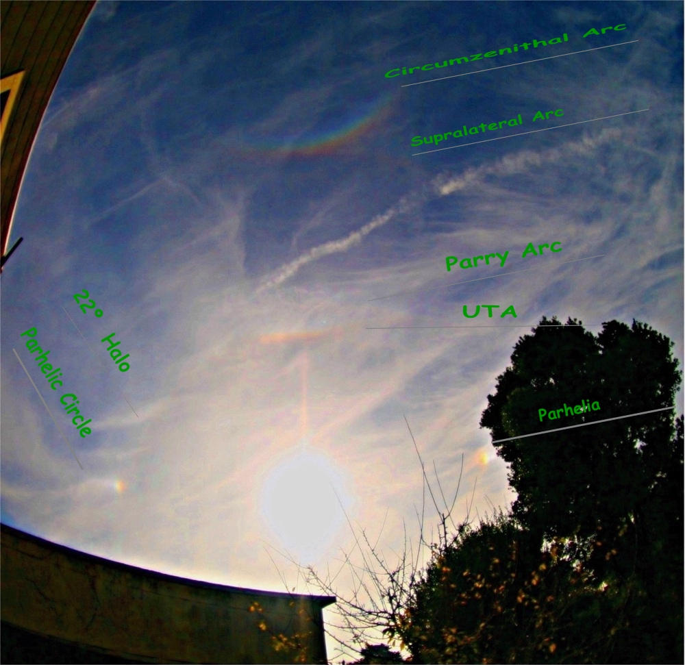 Complex halo display in San Francisco.